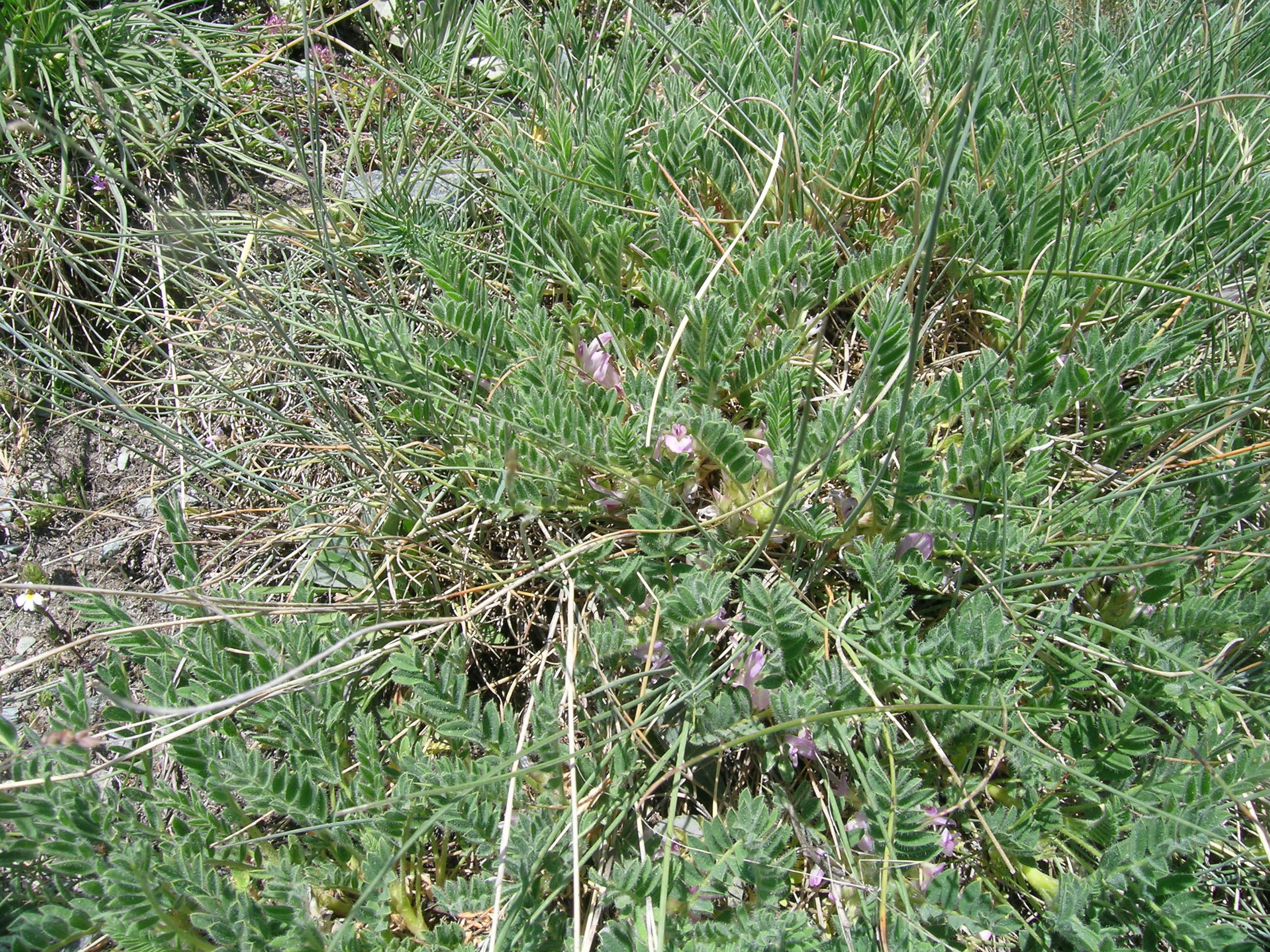 Astragalus sempervirens Lam., Riffelberg (2400 m.a.s), Zermatt, Kanton Wallis, Schweiz